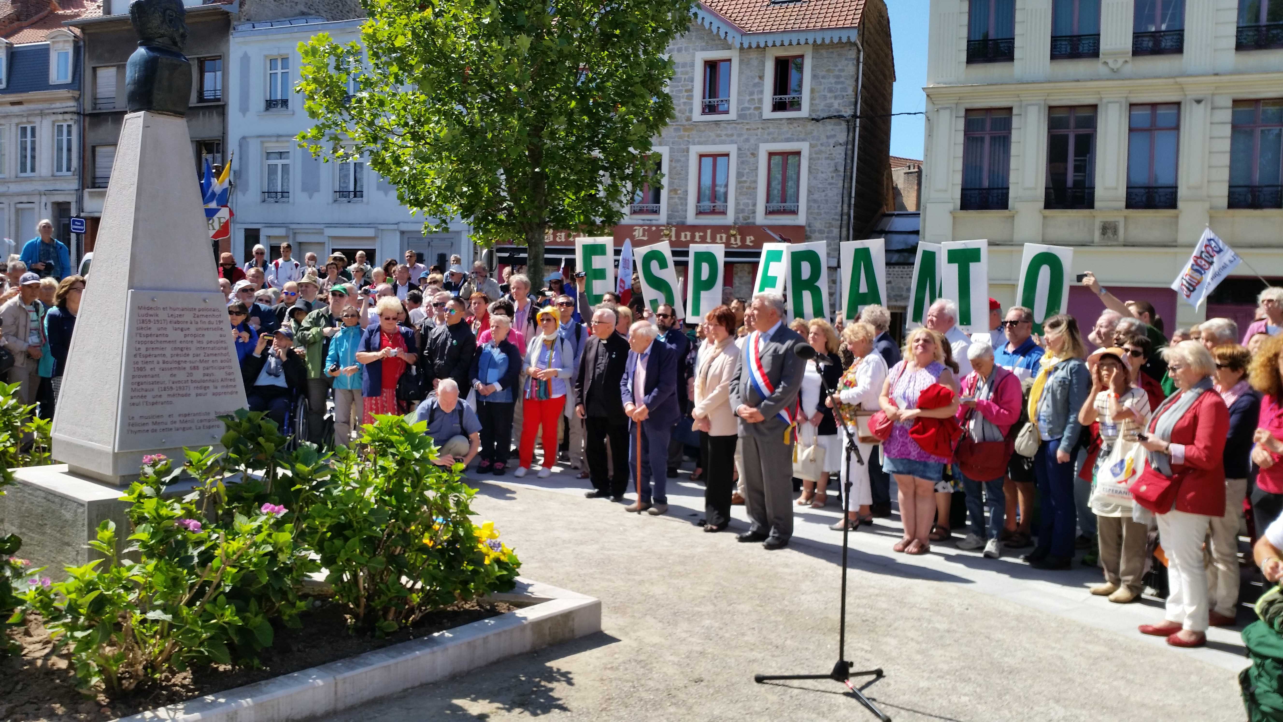 Ceremonio kun la urbestro Frédéric Cuvillier en Bulojno-ĉe-Maro dum la UK 2015